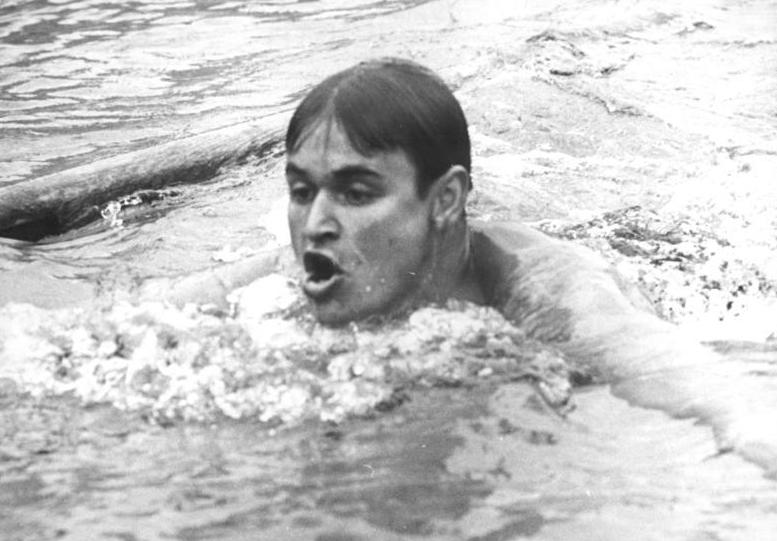 Konrad Enke Zentralbild Kollektiv 2.8.1956 Schwimmwettkämpfe eröffnet Am Donnerstag, dem 2.8.1956, wurden im neuen Leipziger schwimmstadion die Wettkämpfe unter Beteiligung der DDR-Spitzenklasse eröffnet. UBz: Der MEister des Sports Konrad Enke (SC Rotation Leipzig) siegte über 200 m Brust in 2:41,5 min.